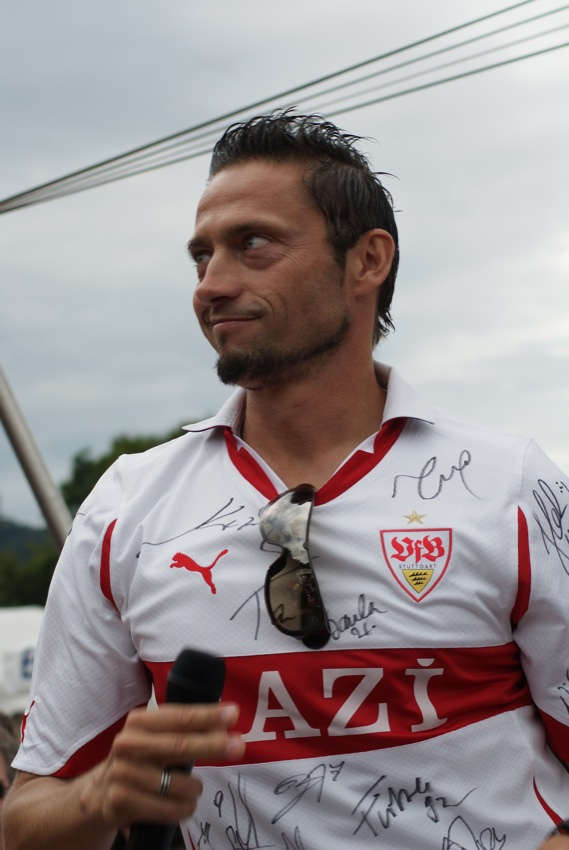 VfB Opening 2010